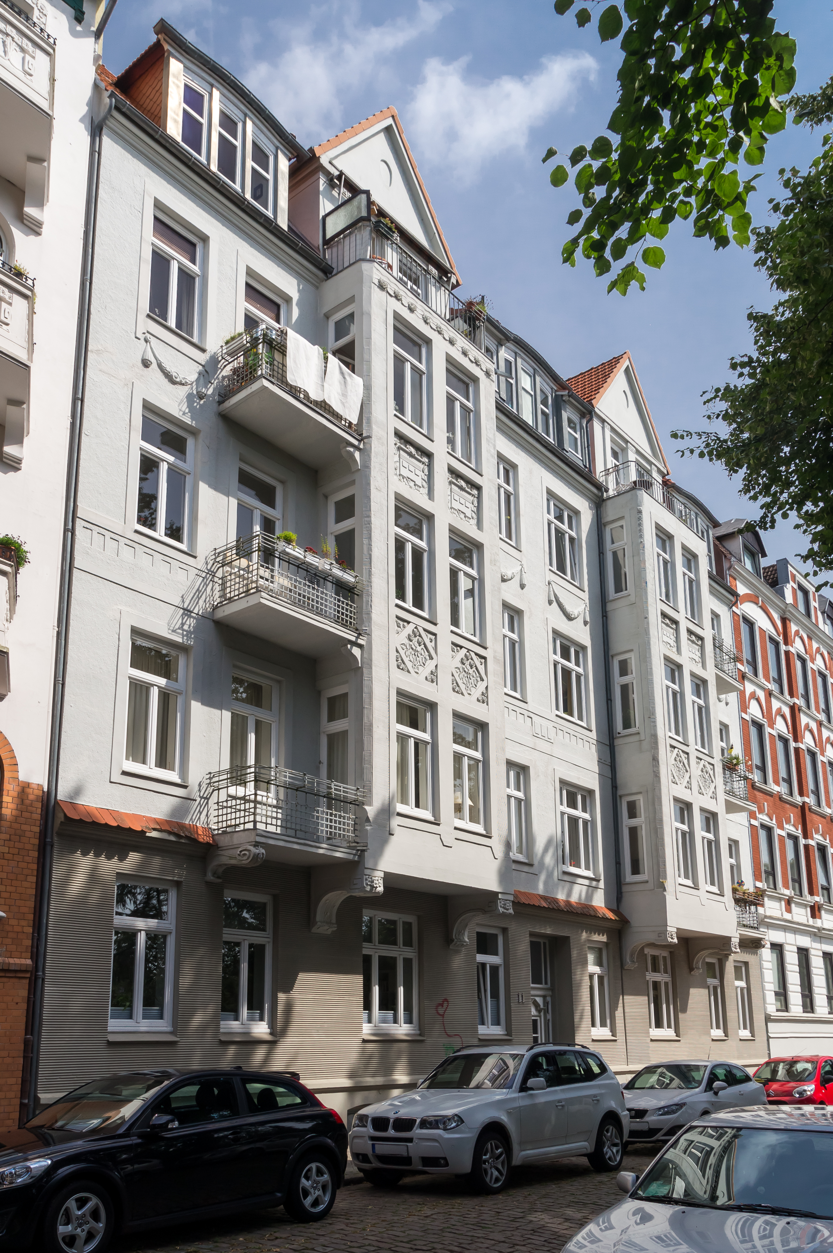 Flensburg-Neustadt; Am Burgfried 11; Mietwohnungshaus; Denkmal-Nr. 2